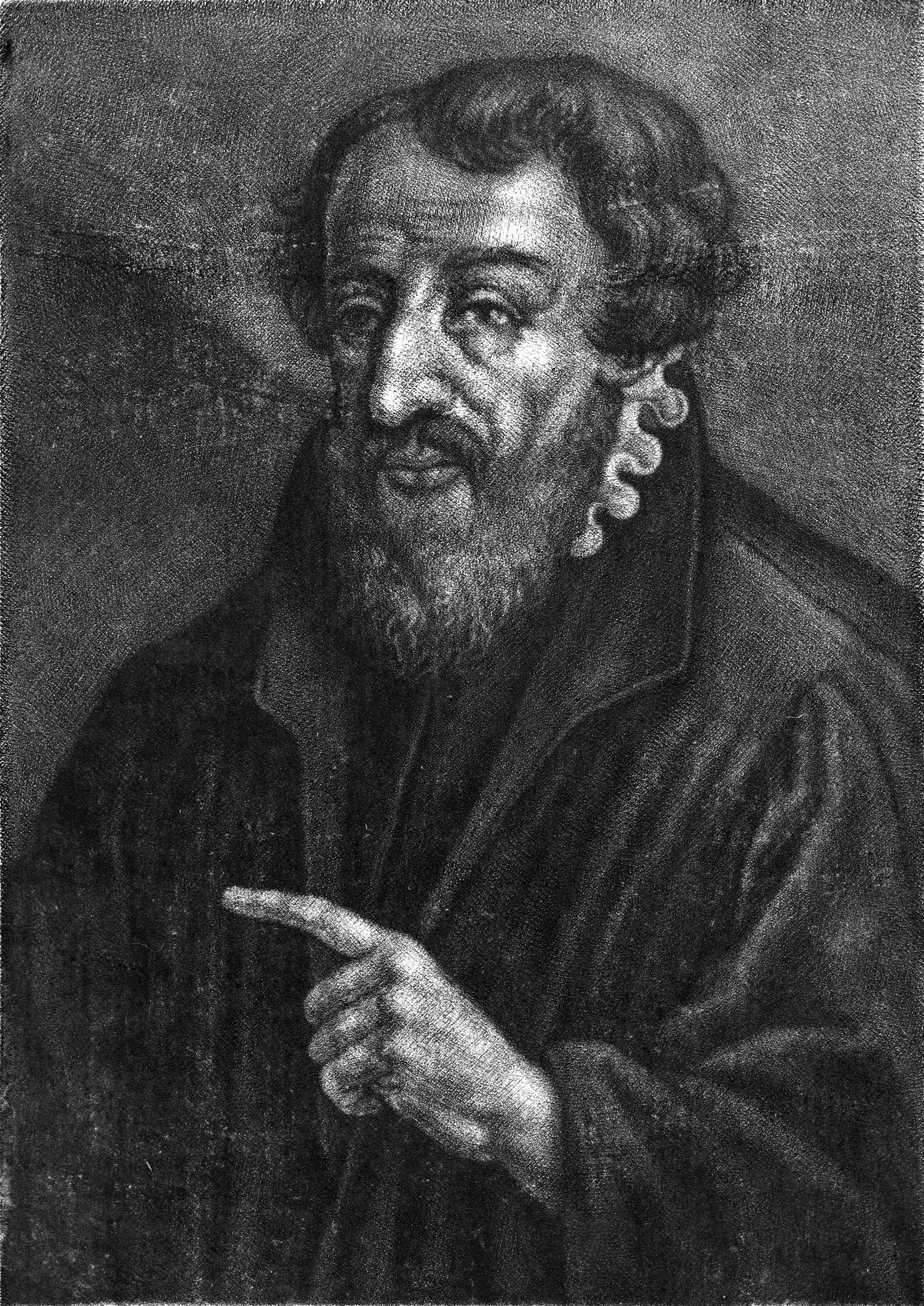 Georg Mehlhorn (1513-1563), deutscher Pädagoge und evangelischer Theologe